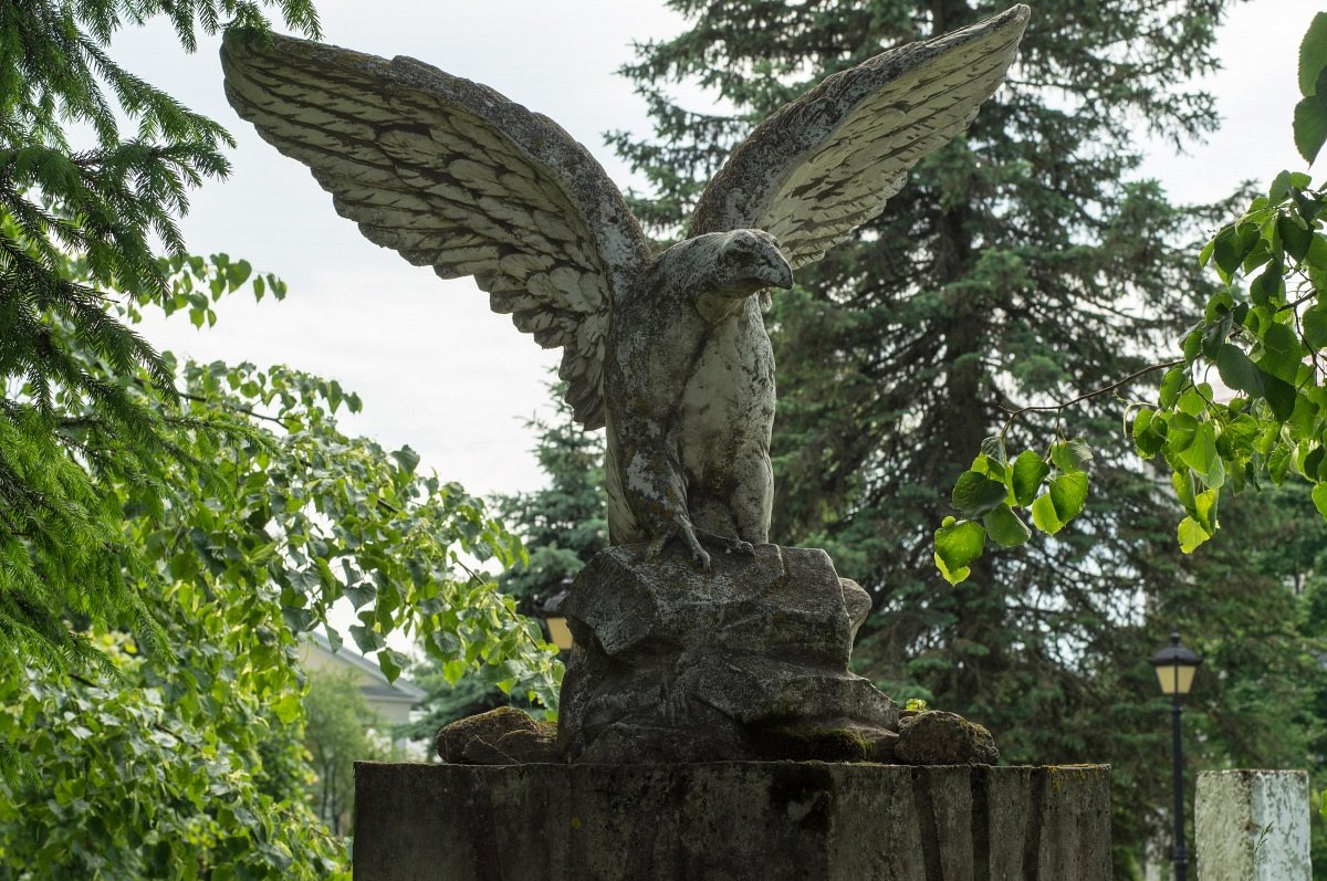 Паставы. Польскі помнік